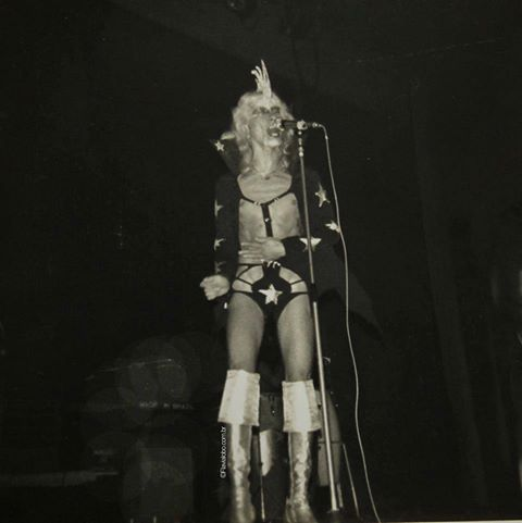 Teatro Bandeirantes - show de lançamento do primeiro disco "Made in Brazil" (Banana)(1974) - Foto de Flavia Lobo